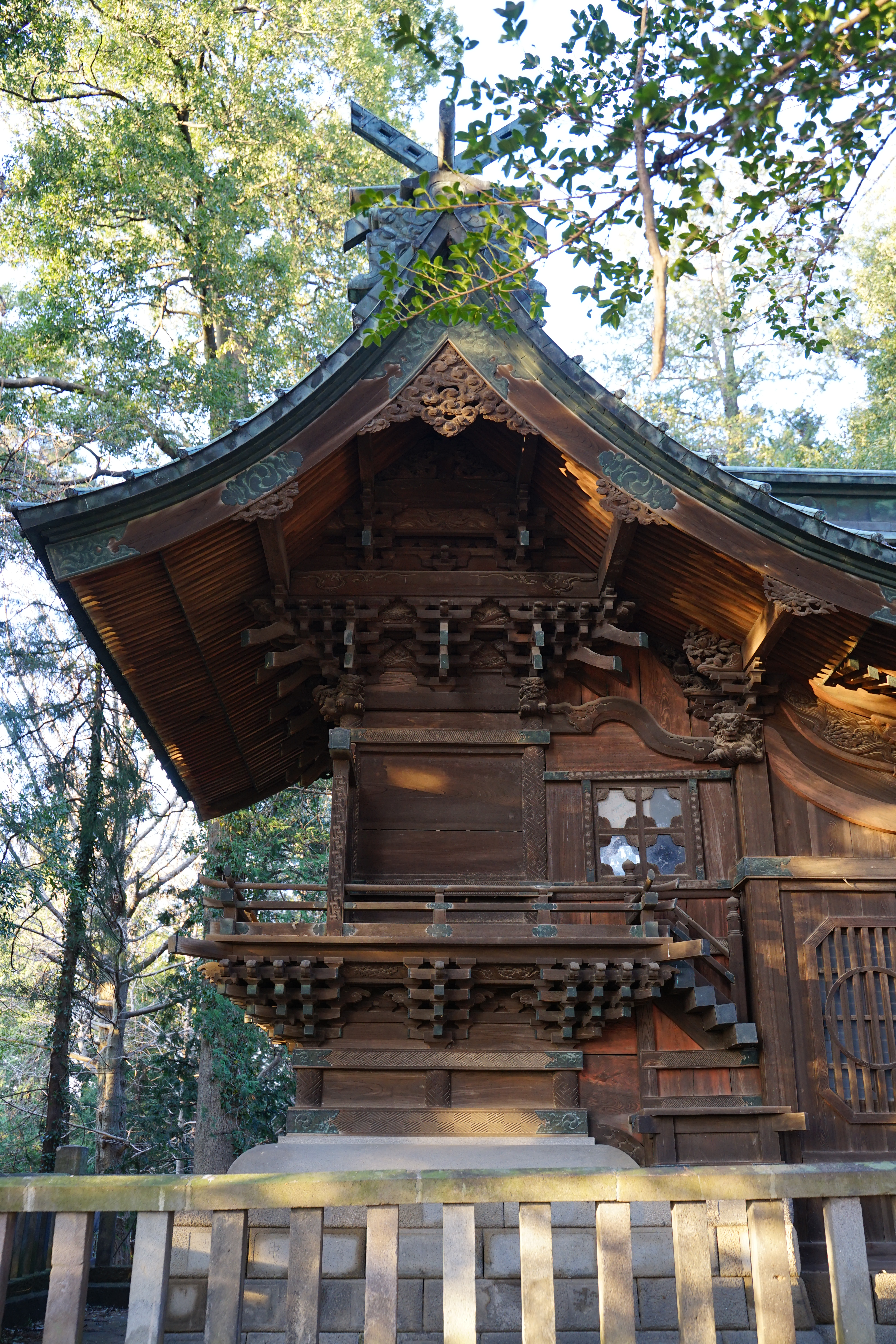 雷電神社の本殿（伊勢崎市境伊与久） Sony ILCE-7M2